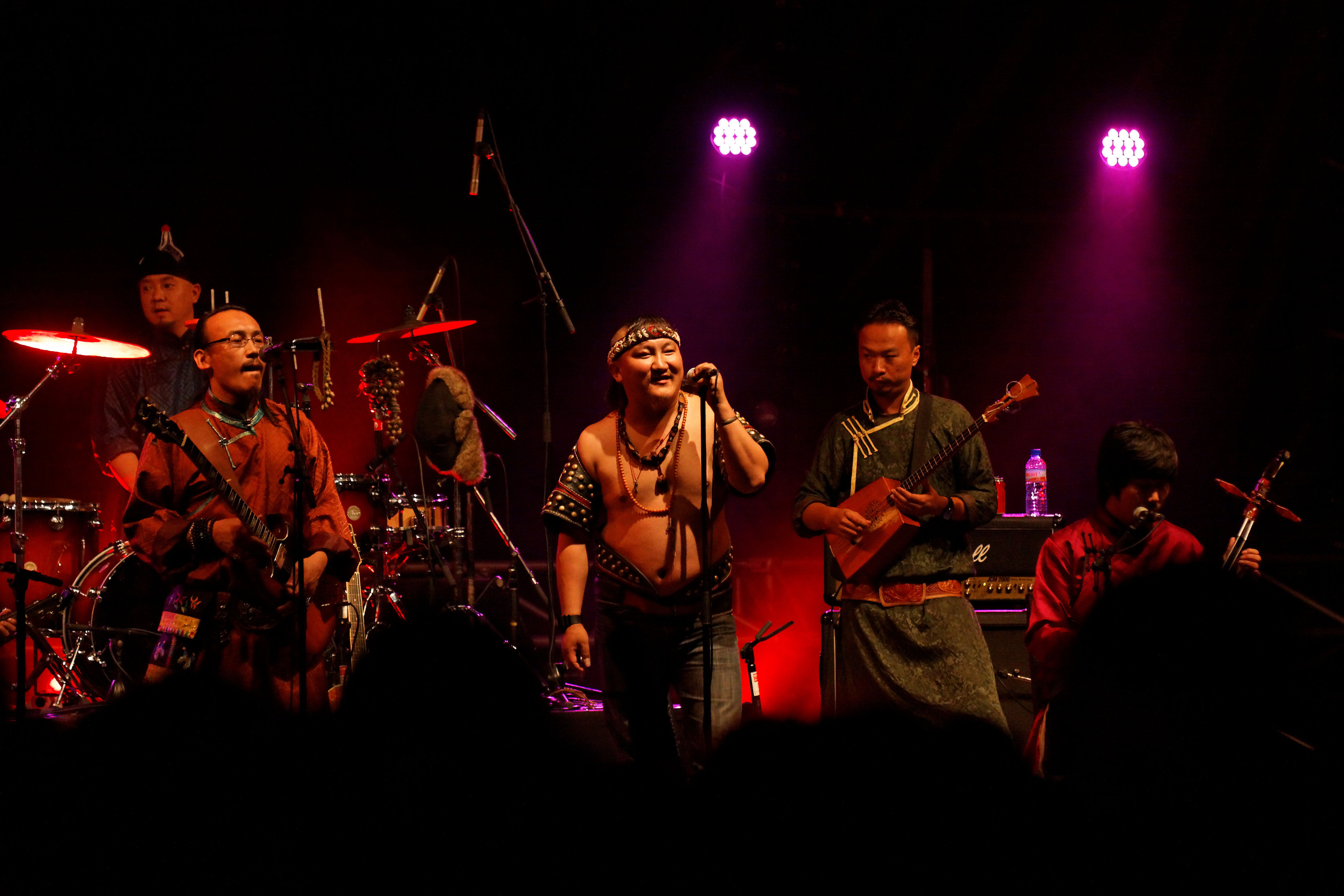 Hanggai en concert sur la scène Kermarrec lors du festival du bout du Monde à Crozon dans le Finistère (France).